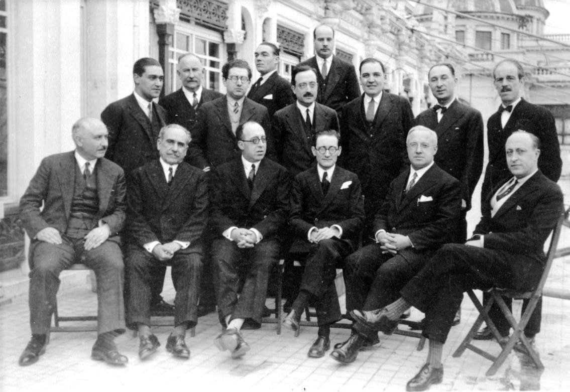 Comensais na homenaxe a Ramón Otero Pedrayo polo seu ingreso na Real Academia Galega en 1929. De pé: César Otero, José Berguer, Pardo, Liste Mourenza, Abelaira, Salvador Mosteiro, Manuel Cabanillas, Calviño Domínguez e Antón Villar Ponte. Sentados: Laureano Alonso (administrador do Sanatorio de Oza), Eladio Rodríguez (naquela altura presidente da RAG), Ramón Otero Pedrayo, Vicente Risco, Ángel del Castillo e Rafael González Villar.